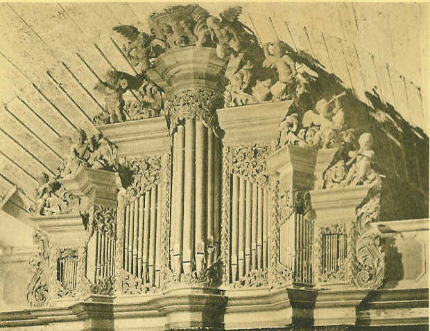 Schlosskapelle Erxleben - Orgel vor der Zerstörung 1945